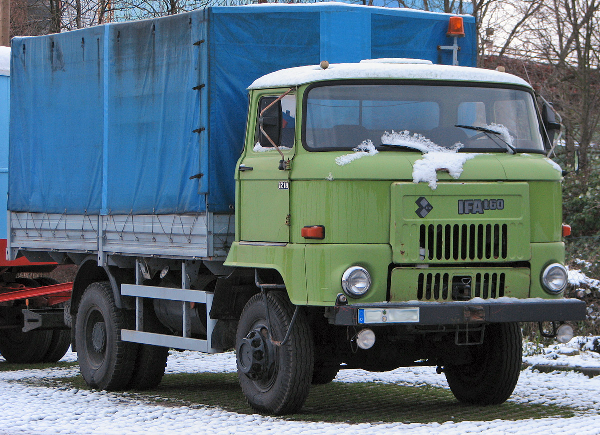 Beschreibung: IFA L60 Fotograf: Darkone, 16. Dezember 2005